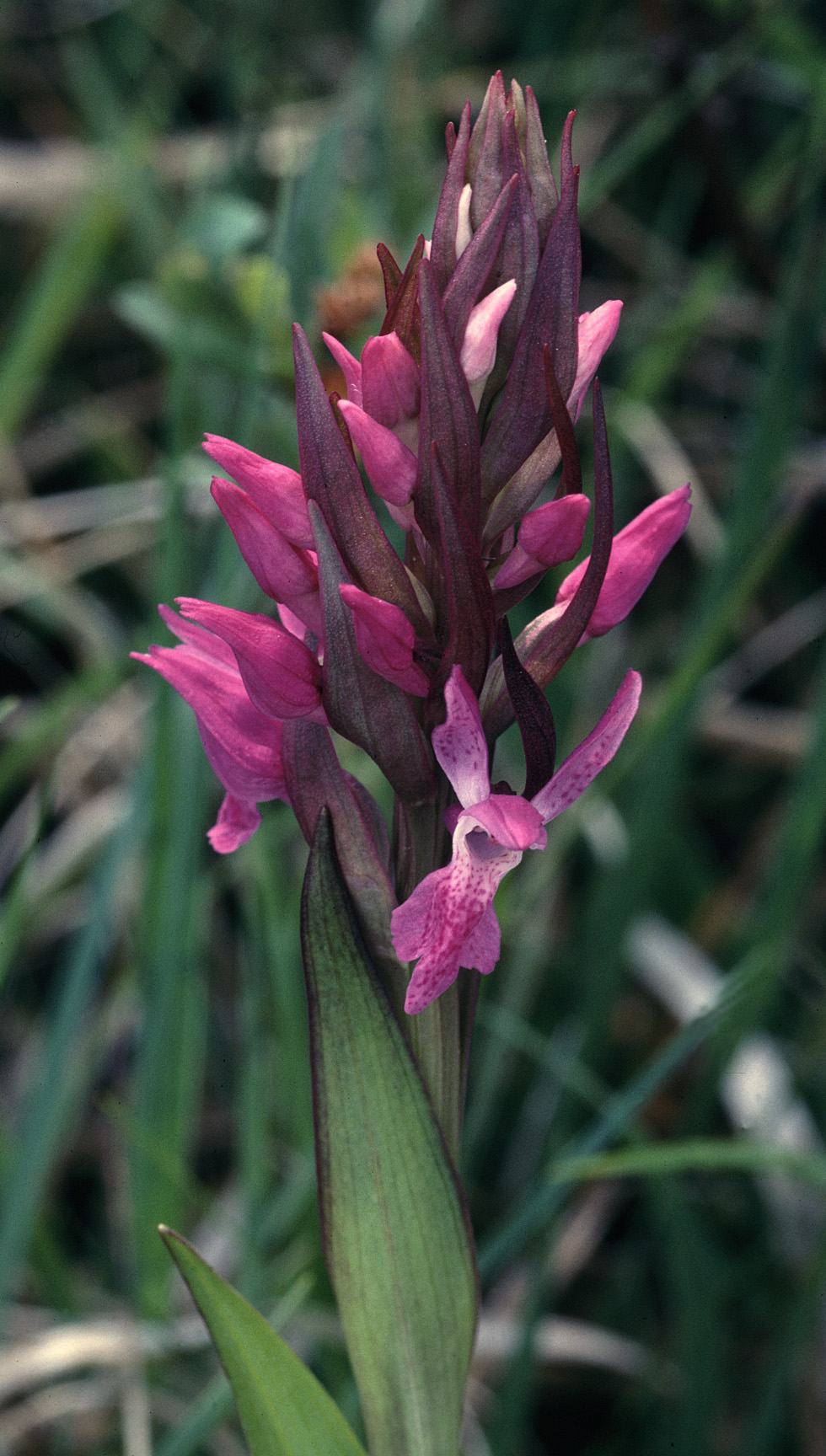 Dactylorhiza traunsteinerioides Burren, Co. Clare, Ireland